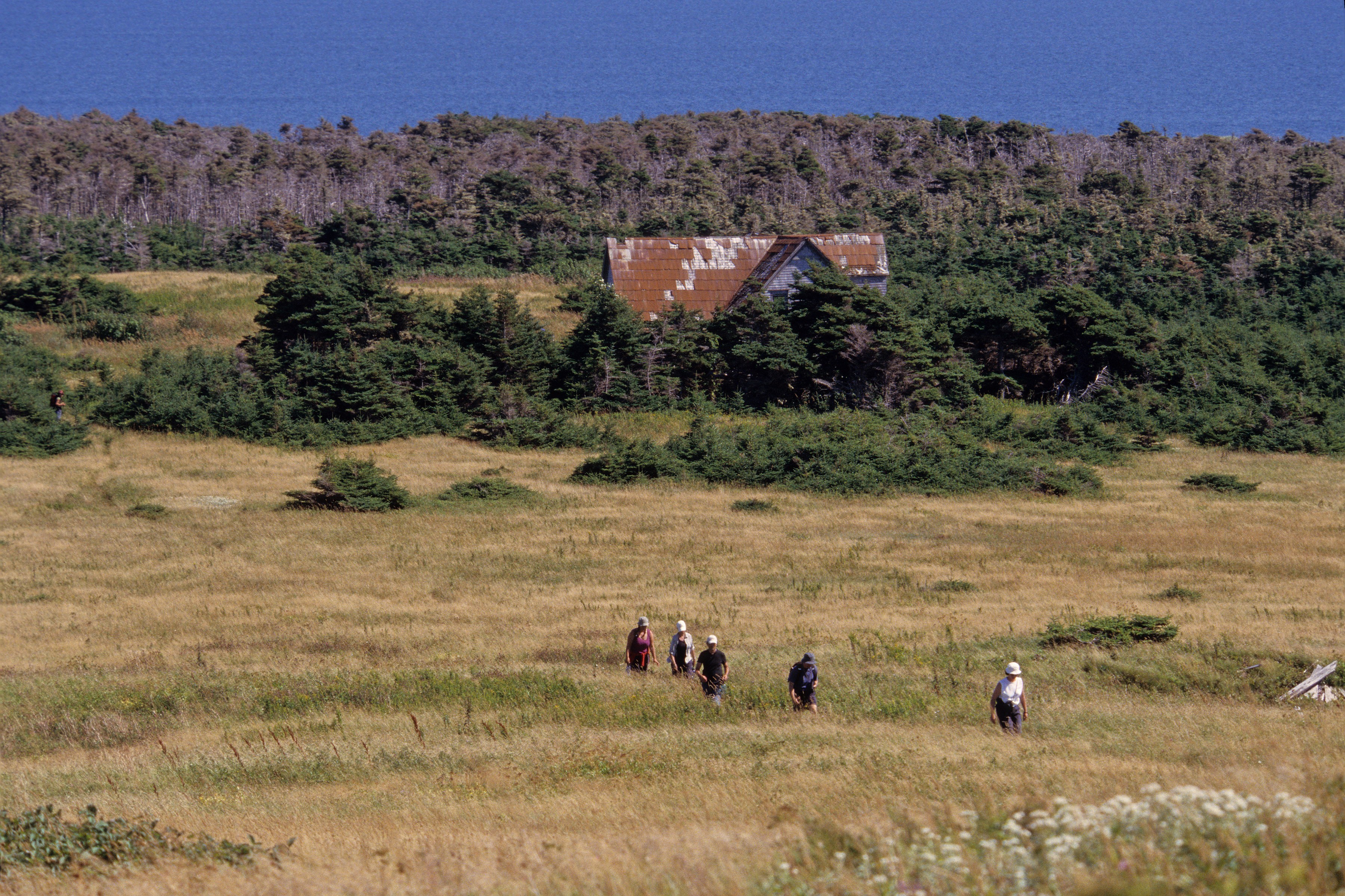 Randonneur devant la maison Dingwell sur l'île Brion